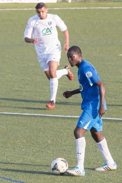 Ibrahima Ba durant un match de Coupe de France 2014 (Istres-Côte Bleue)